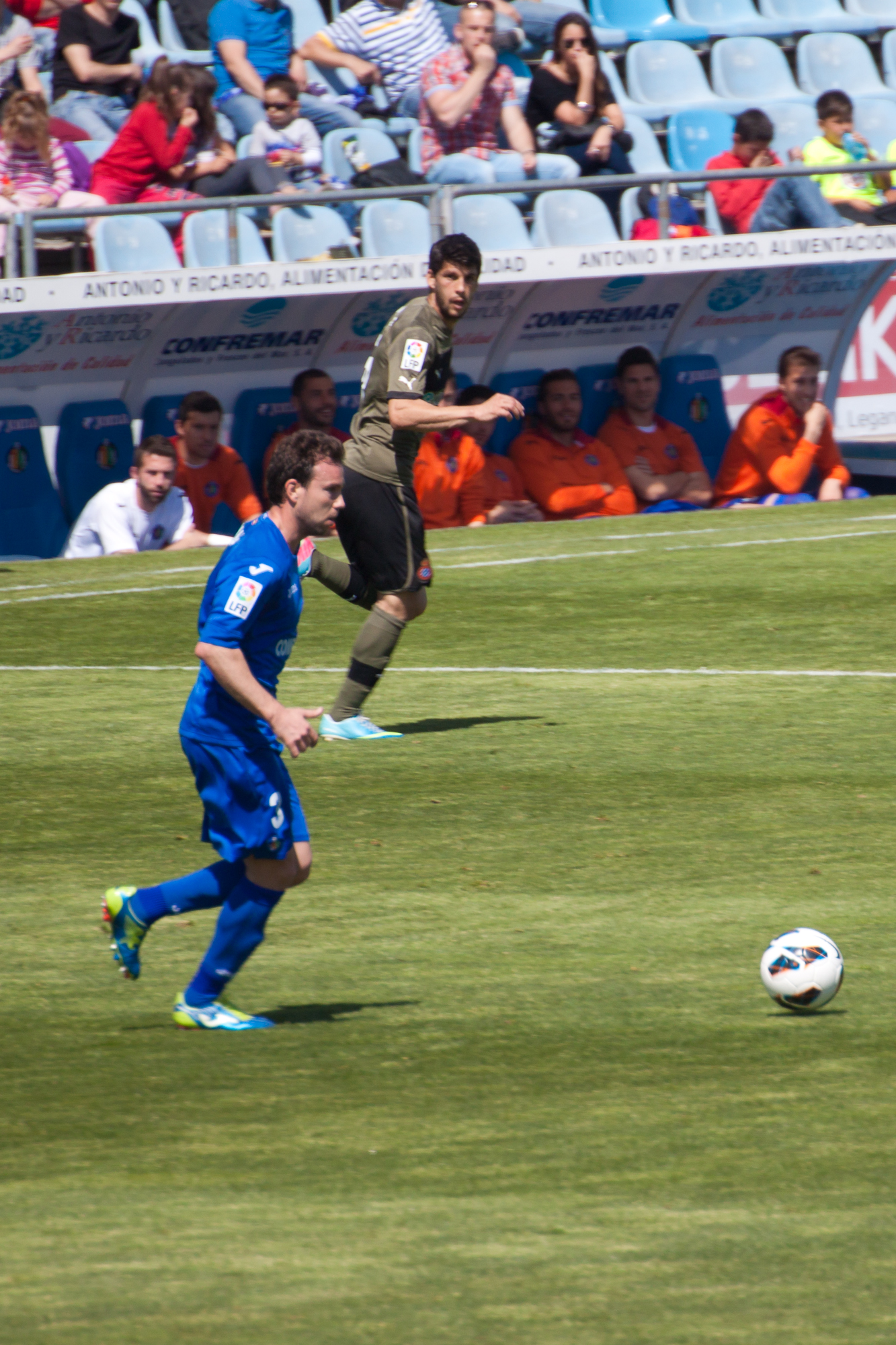 José Manuel Jiménez Ortiz (Algeciras, España, 21 de diciembre de 1981), es un futbolista español. Juega de defensa, normalmente en la posición de lateral izquierdo. Partido celebrado el 21-04-2013 entre el Getafe C.F. - R.C.D. Español correspondiente a La Liga.